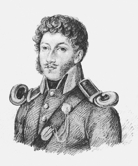 Portrait des Juristen und Beamten Ferdinand Heinke.